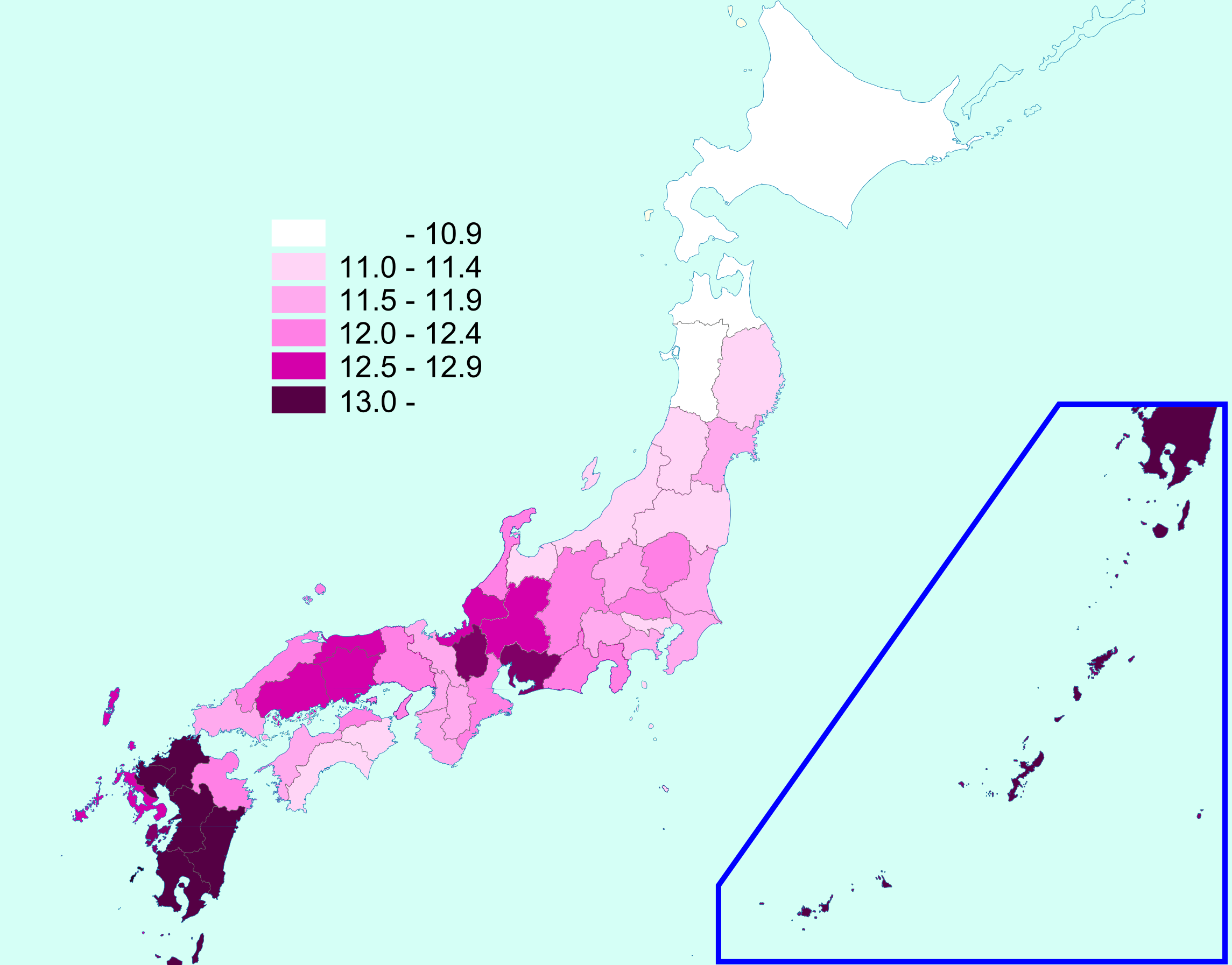 出典：厚生労働省